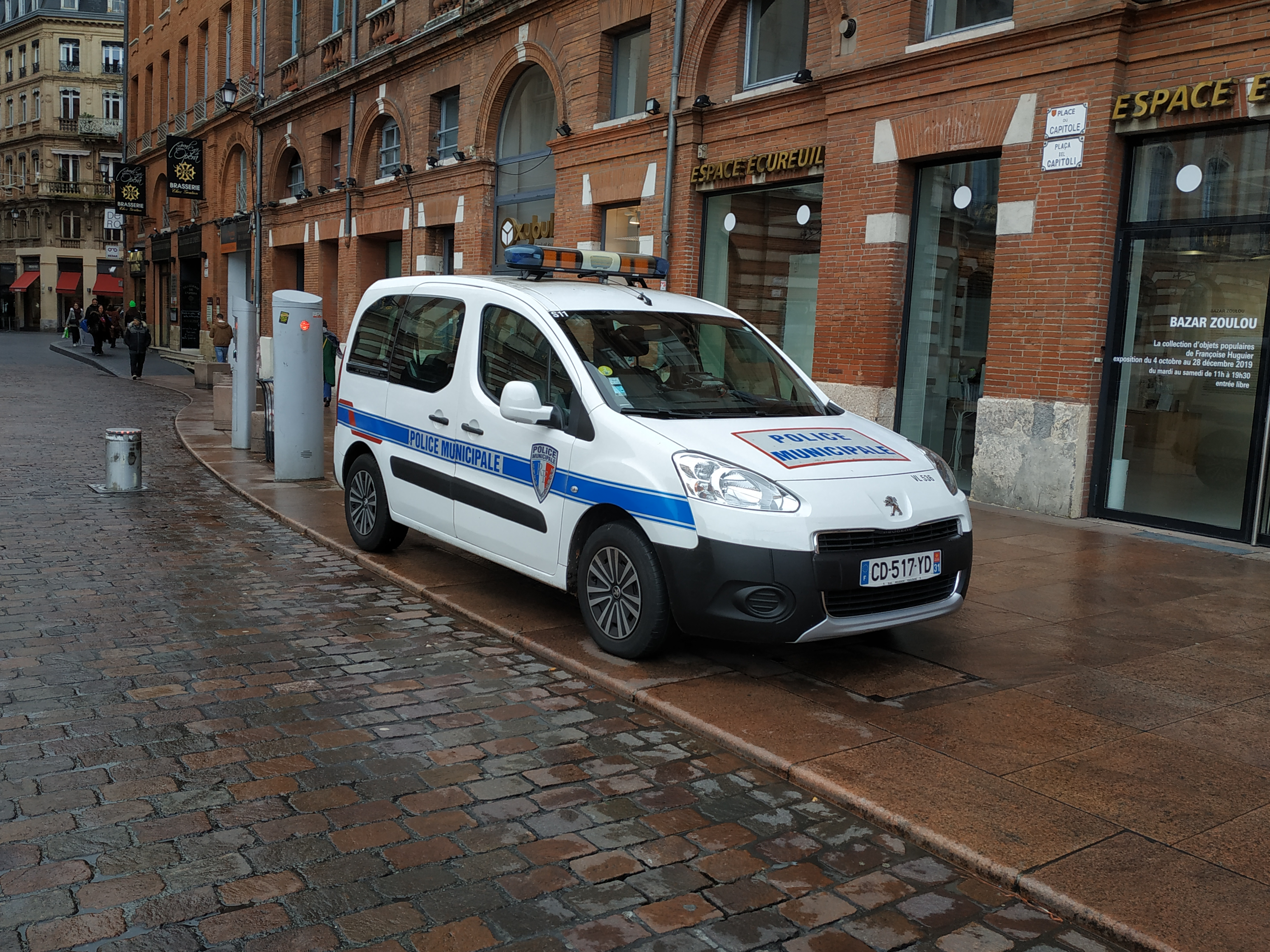 Peugeot Partner de la police municipale de Toulouse